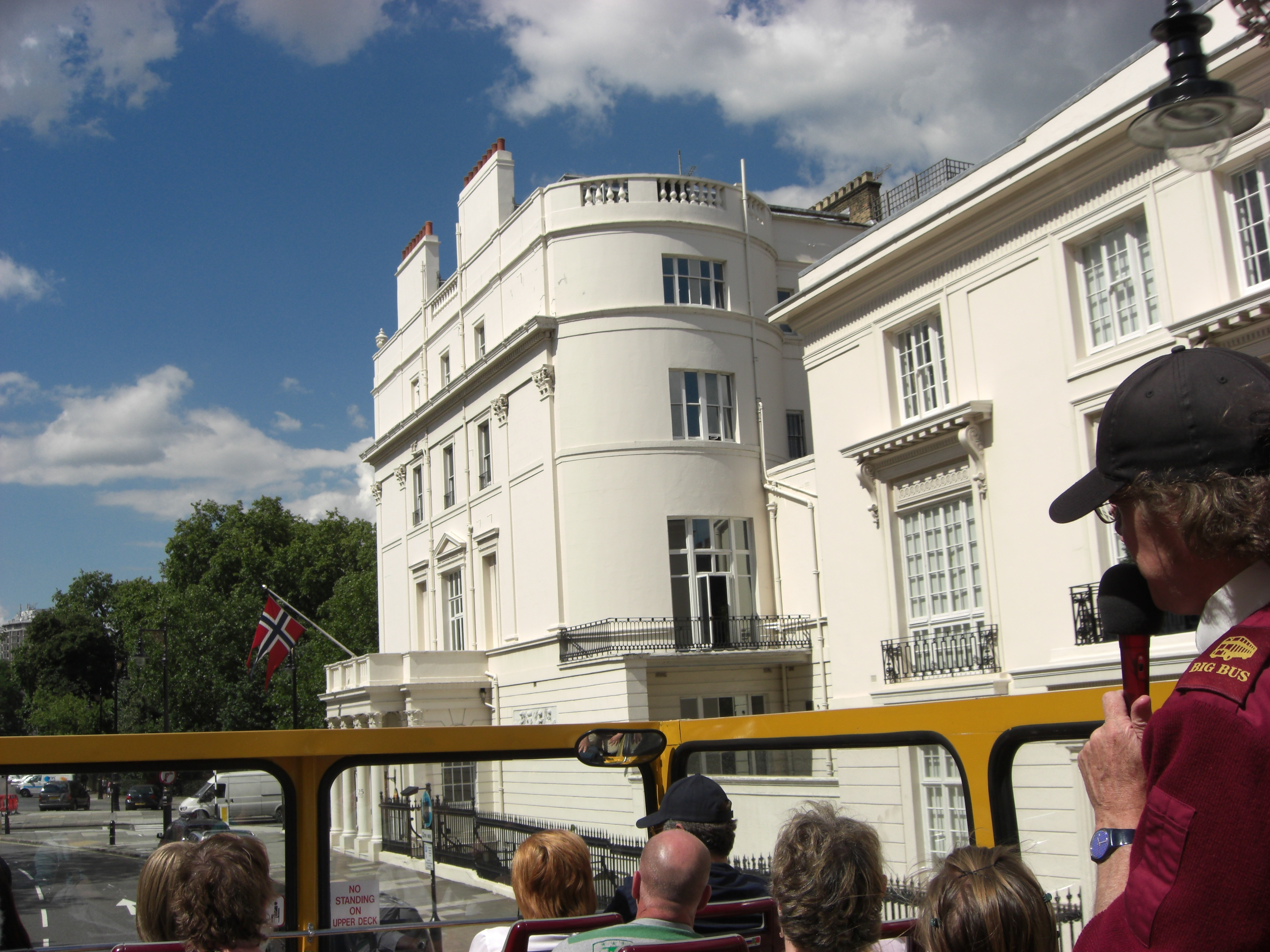 Den norske ambassaden i London (Norway's embassy in London)